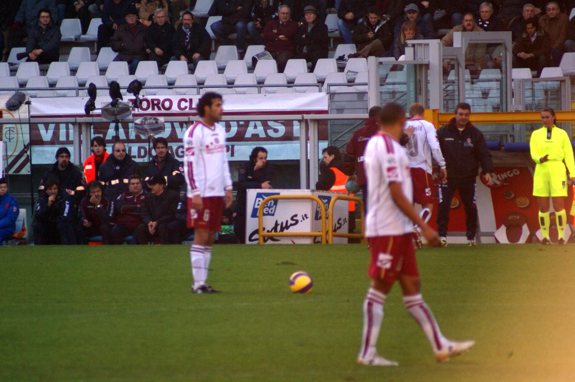 Da Torino-Livorno 1-2, 19ma giornata Serie A